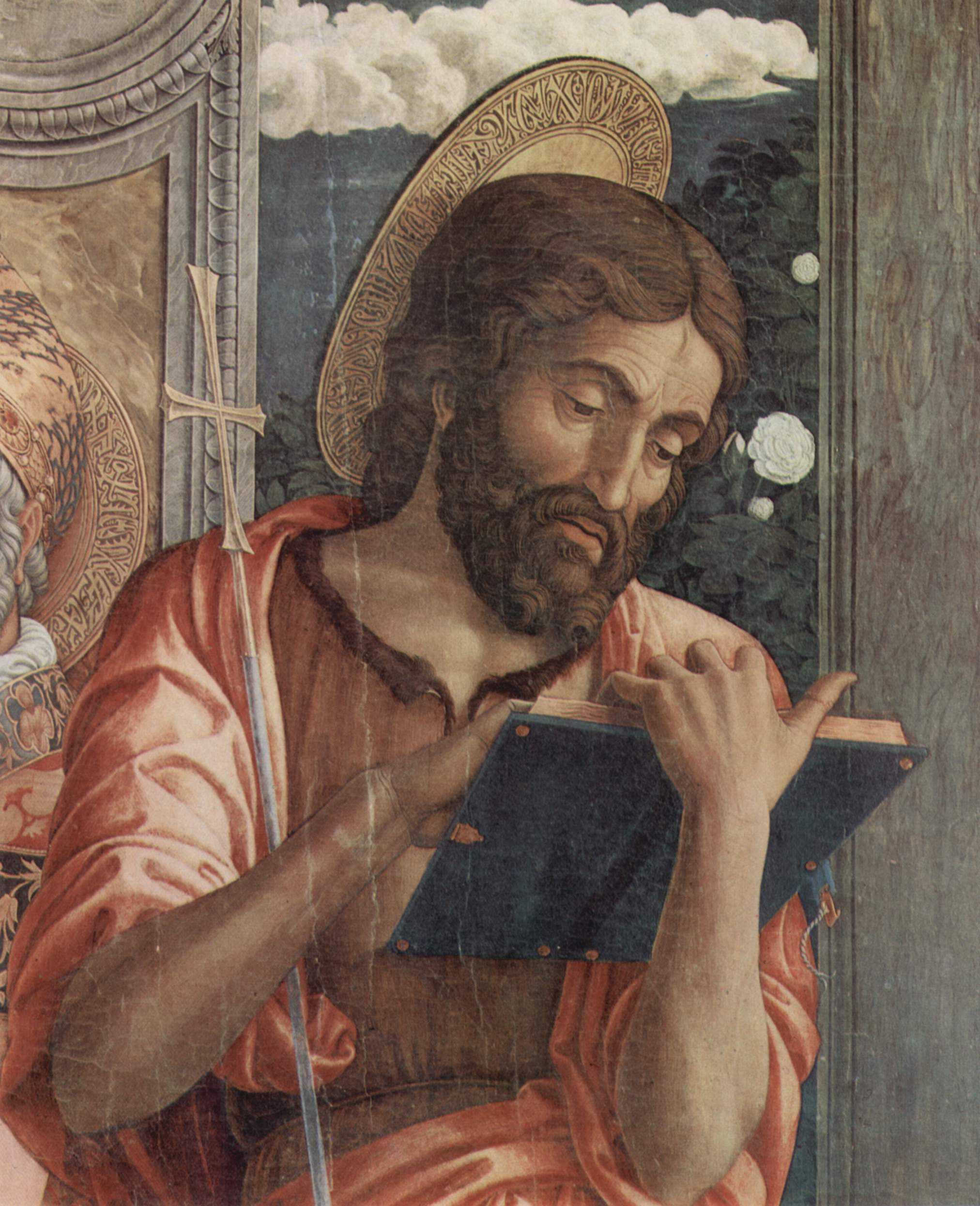 Triptychon, Auftraggeber: Abt von San Zeno, Predellatafeln in Paris und Tours